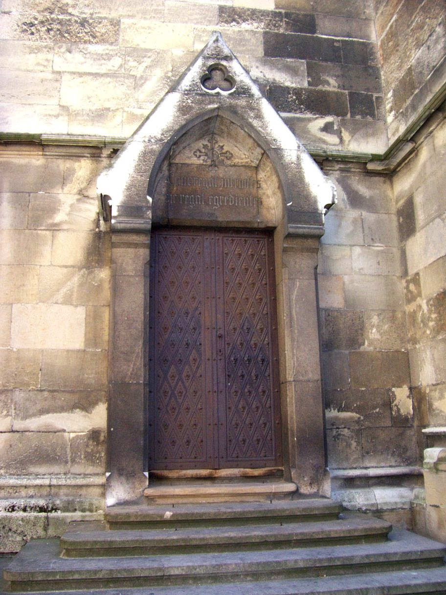 Pôvodný malý portál zo 14. storočia v severnom múre katedrály